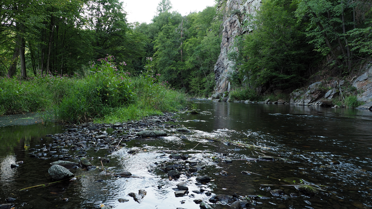 Kamptal bei Steinegg (Gemeinde Altenburg) aufwärts, rechts die sog. "Völkerwand".